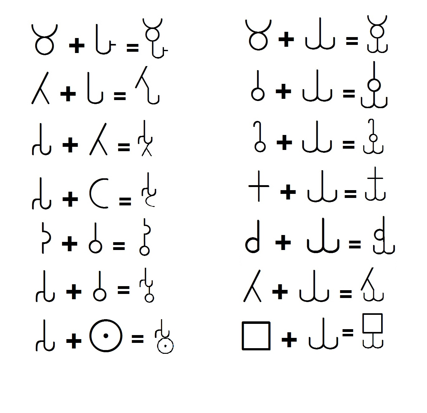 ब्राम्हि जोडाक्षरे